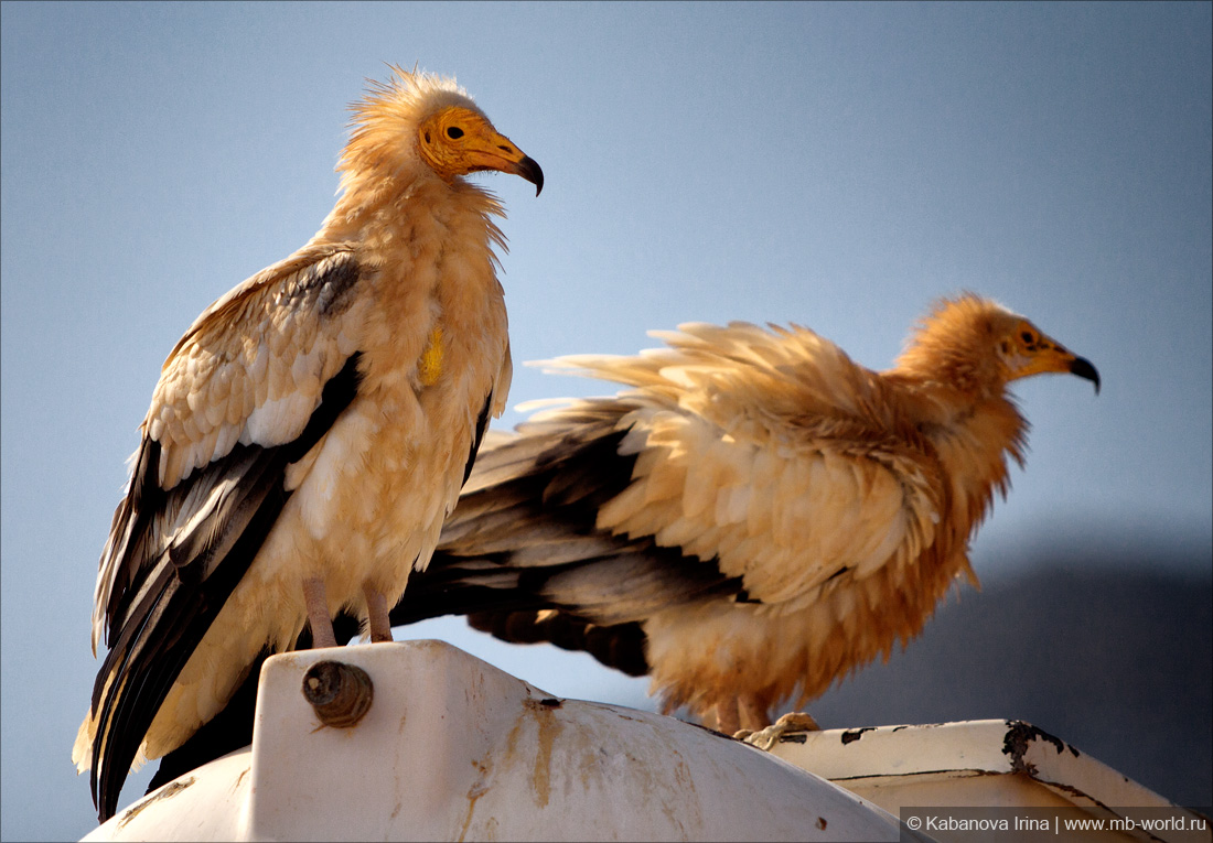 Стервятники - наиболее популярные птицы остров архипелага Сокотра